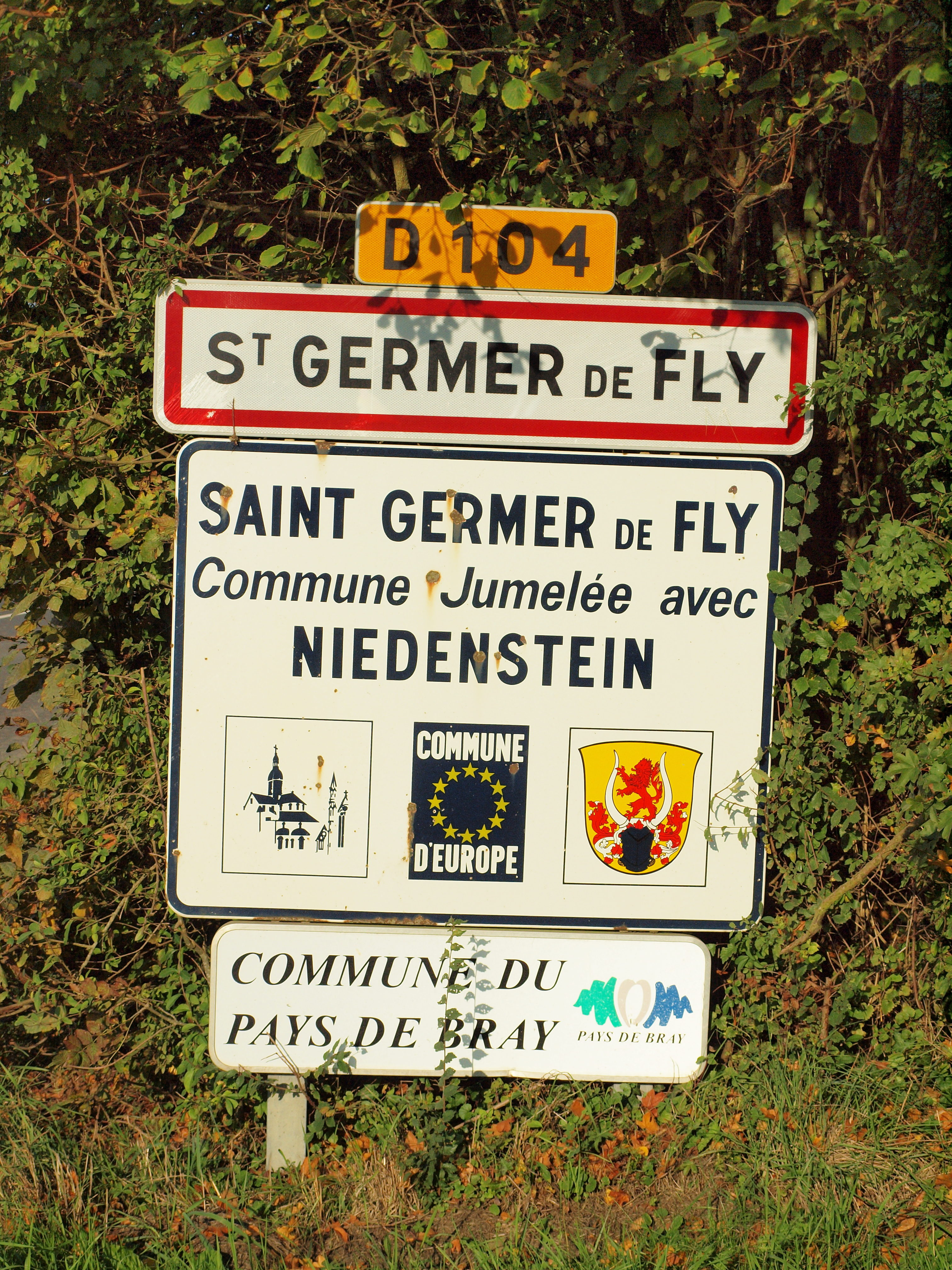 Saint-Germer-de-Fly (Oise, France)